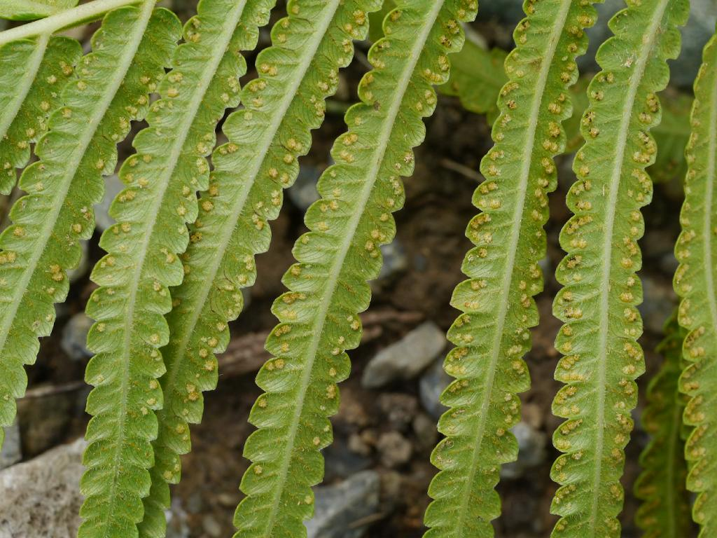 Cyclosorus interruptus：テツホシダ 2015/08/25 沖縄本島：Okinawa Island, Japan